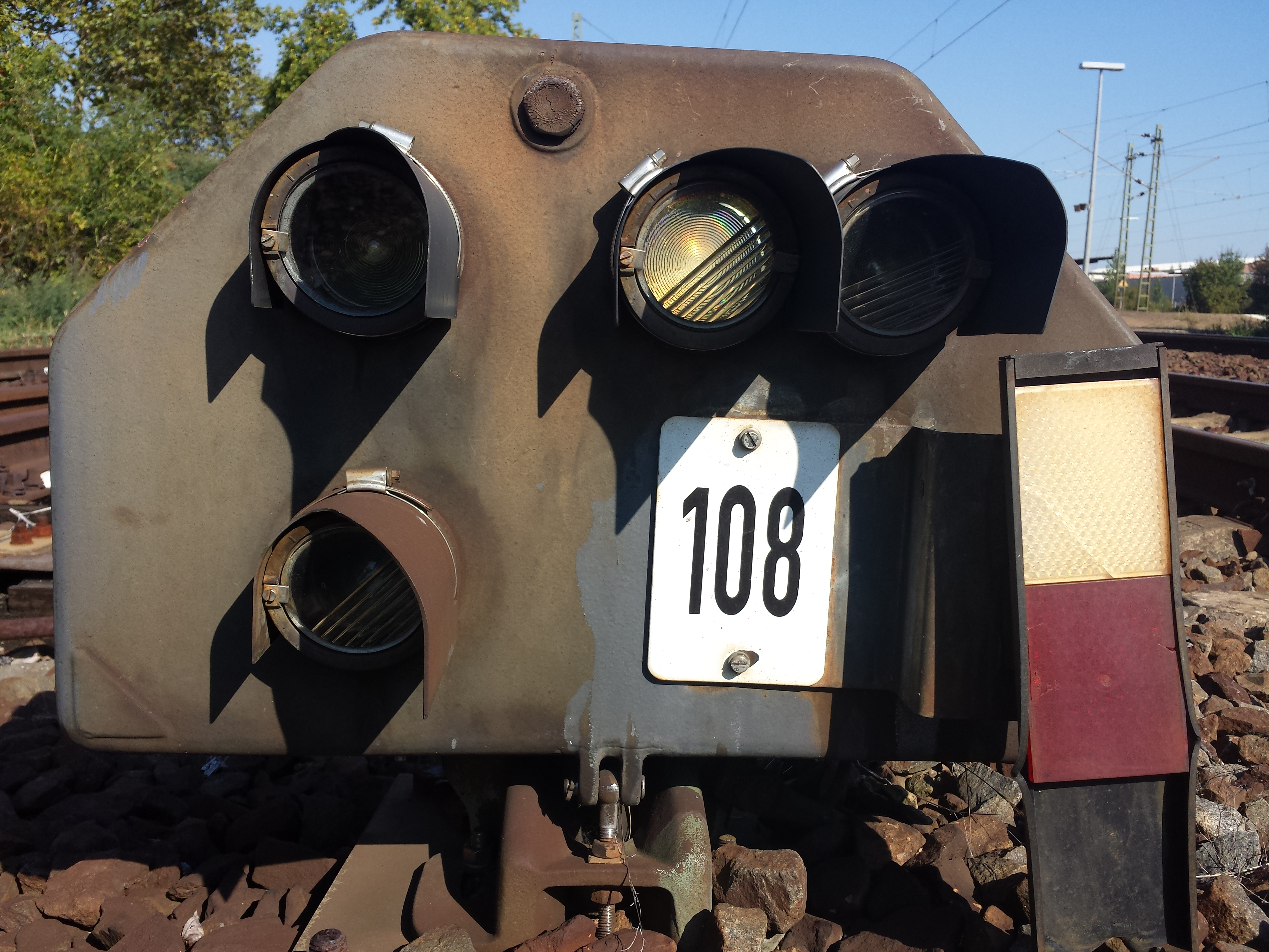 Kennlicht an einem niedrigen Lichtsperrsignal im Lampertheimer Bahnhof